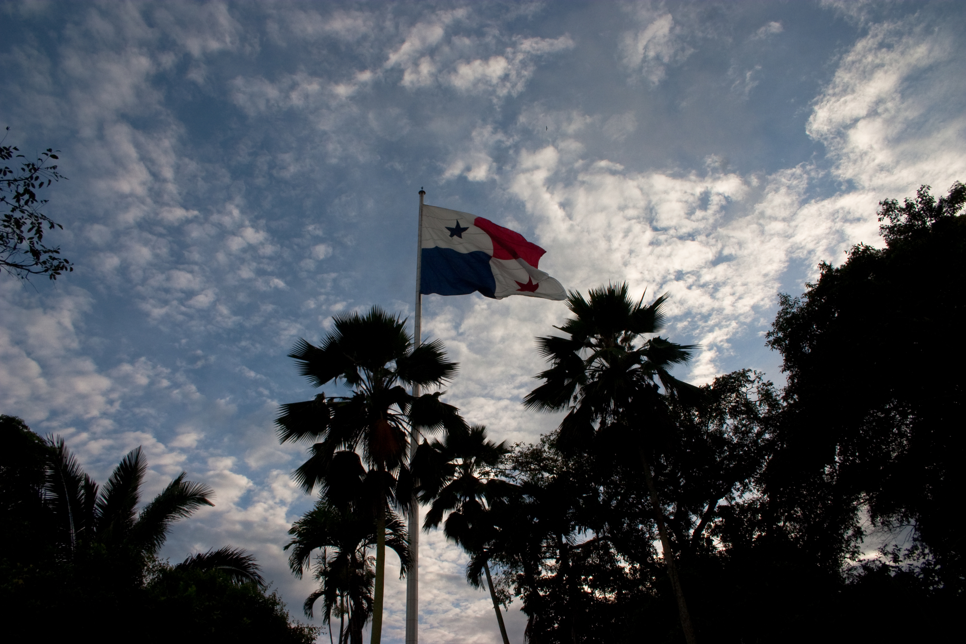 Bandera en el Cerro Ancón, ciudad de Panamá.